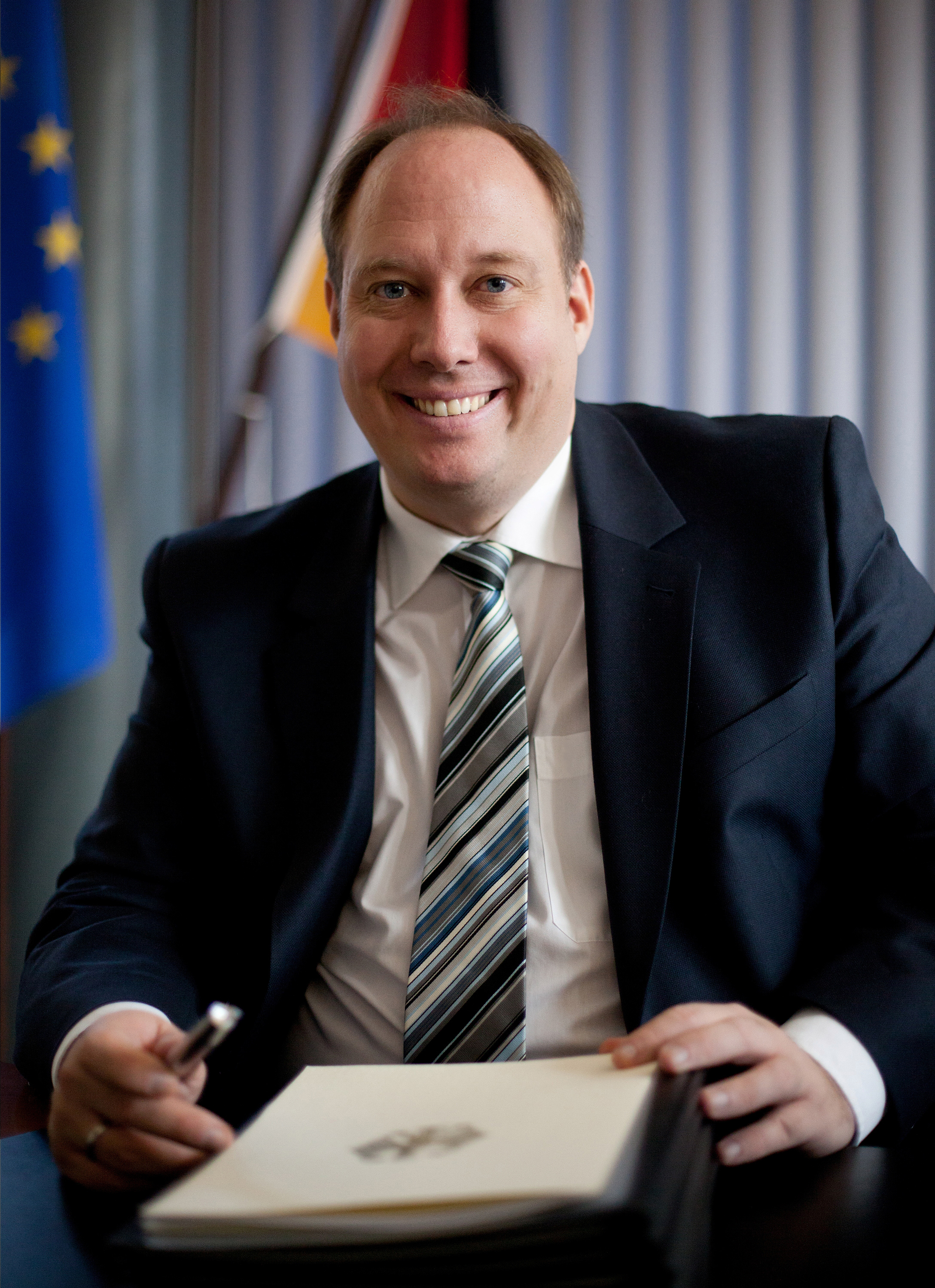 Helge Braun, MdB